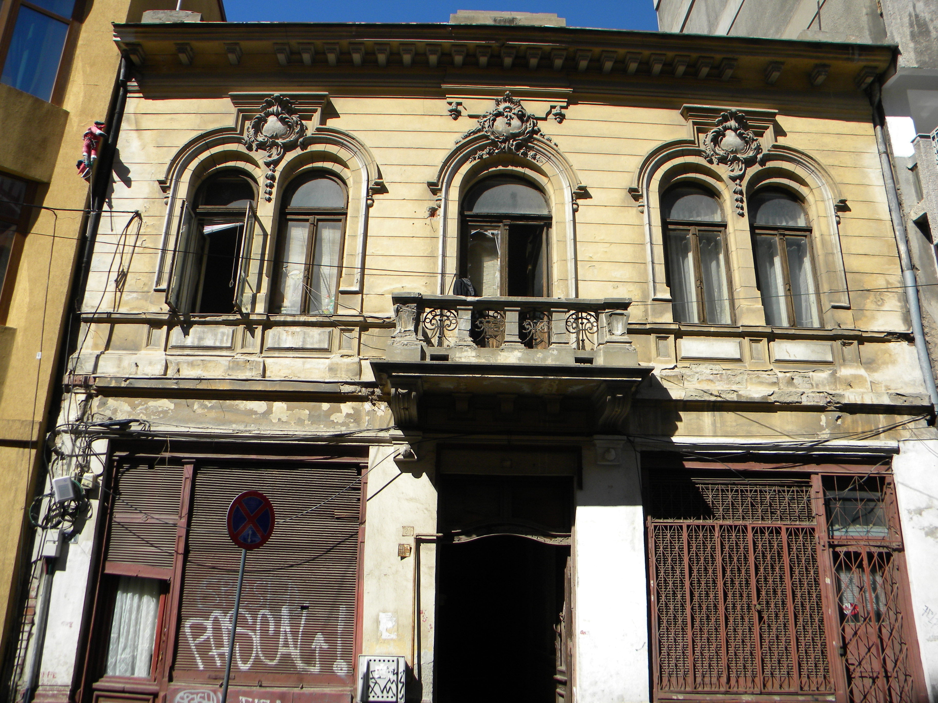 Bucuresti, Romania, Casa pe Str. Coltei nr. 21, sect. 3